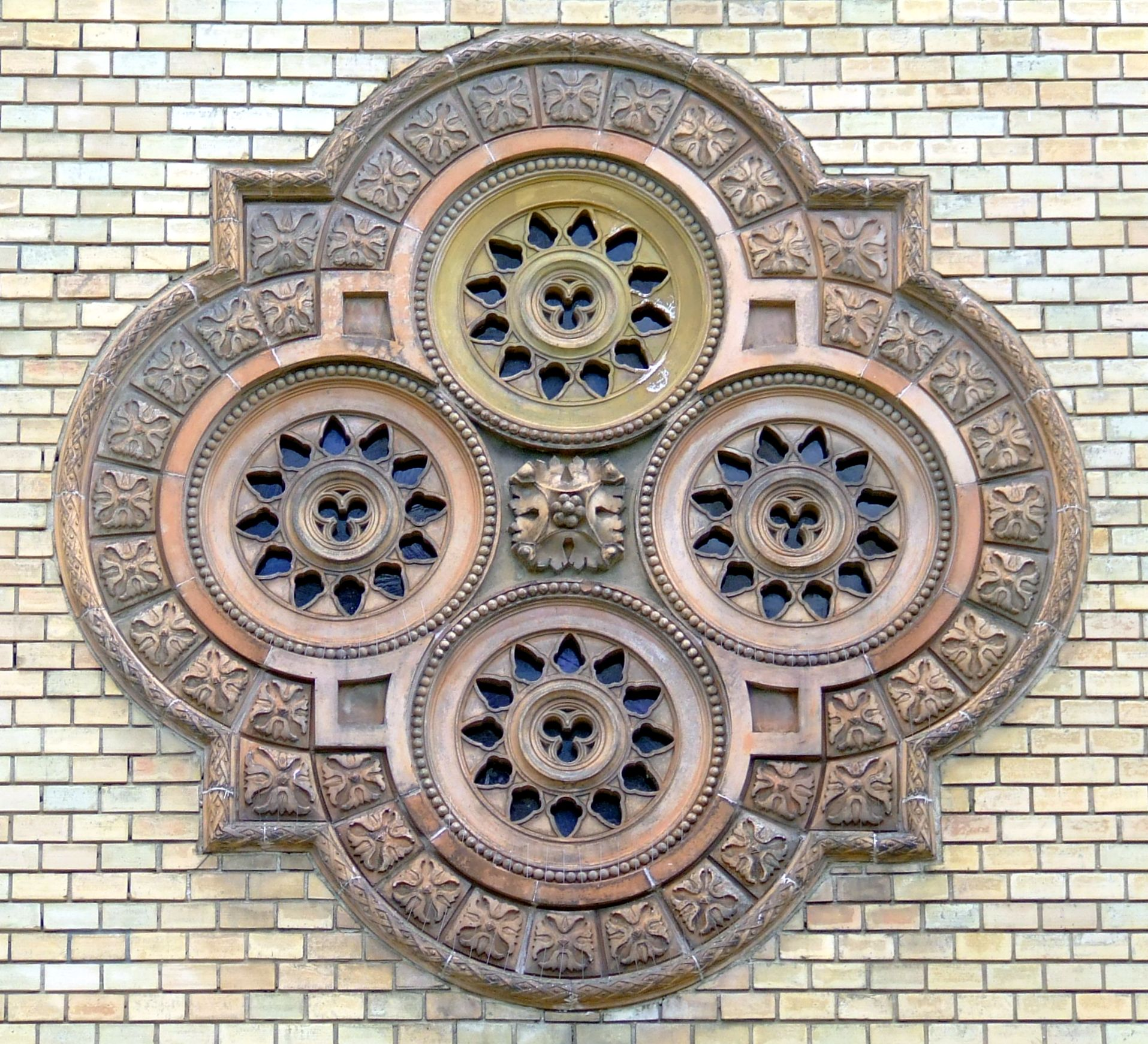 Rózsaablak a szekszárdi zsinagóga bejárata felett